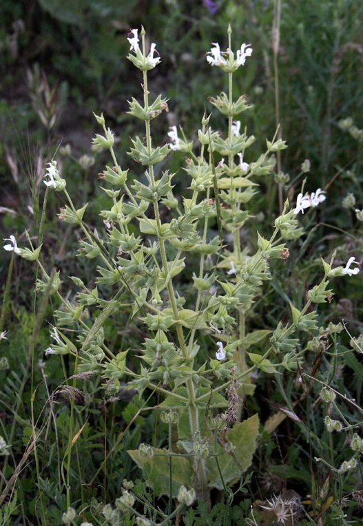 گیاه مَرمَرشک